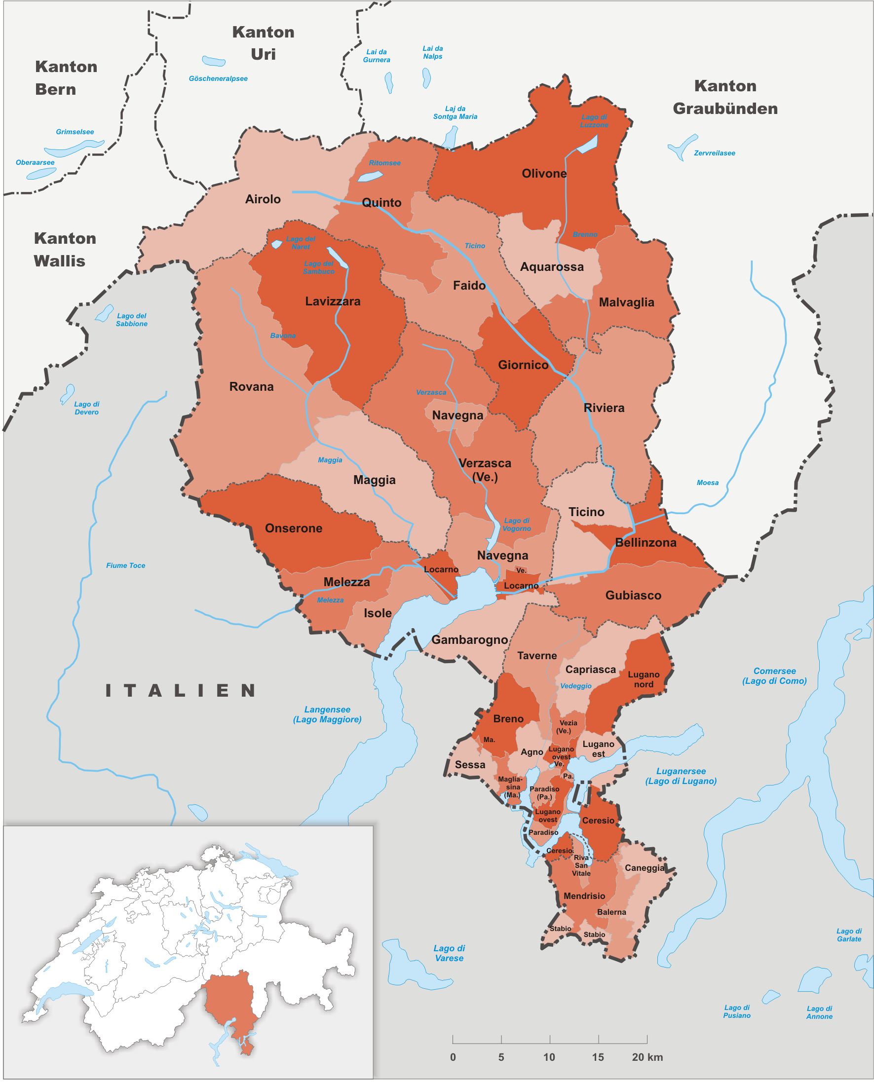 Kreise des Kanton Tessin